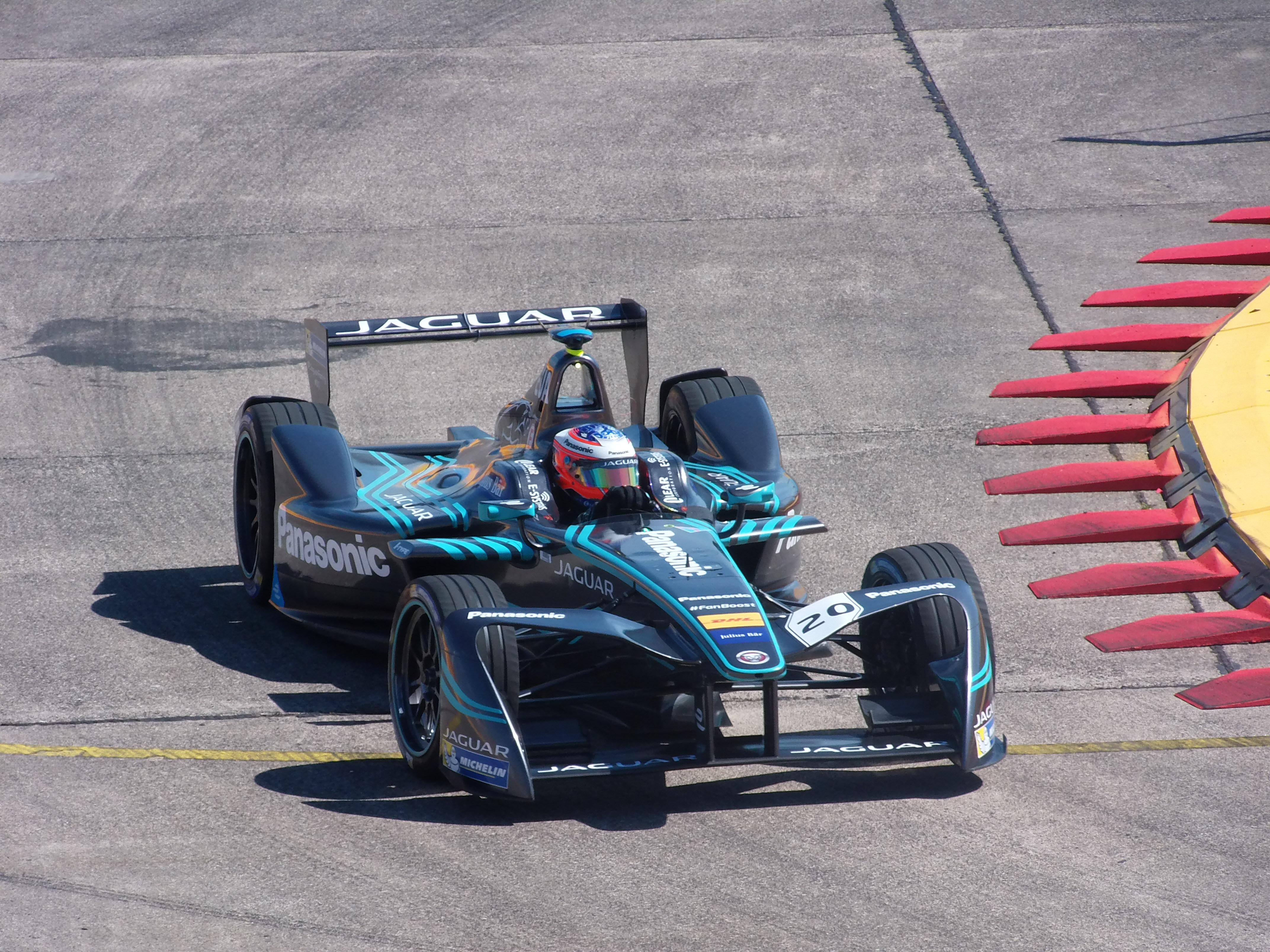 Mitch Evans (Jaguar Racing) beim Berlin ePrix 2017